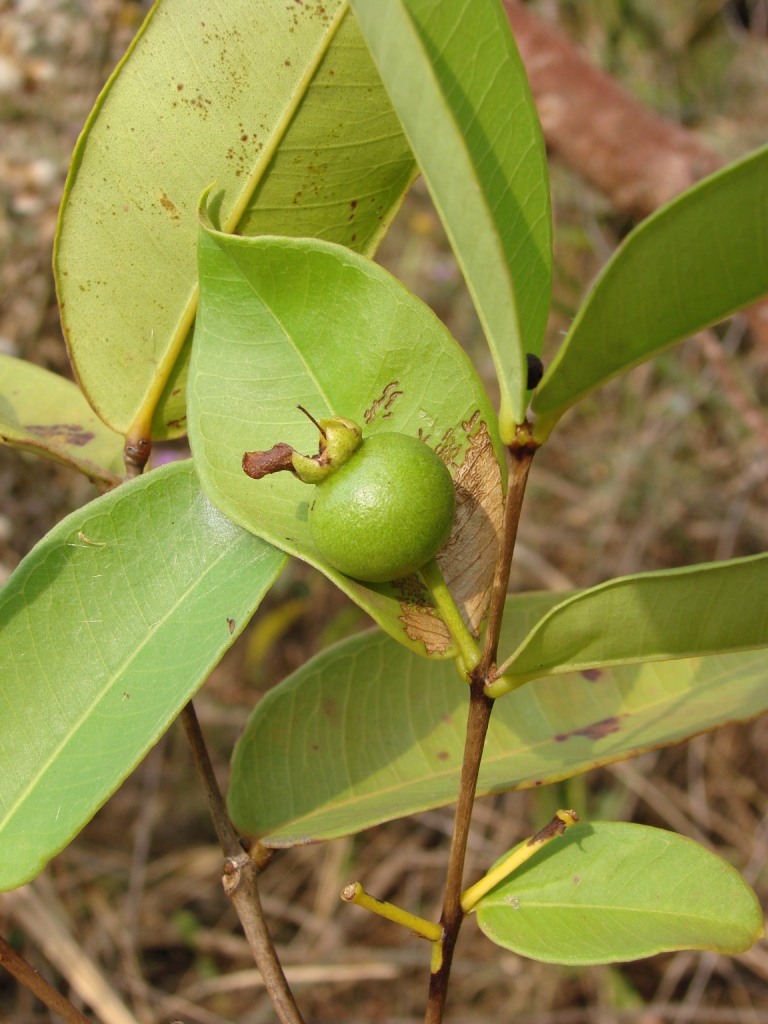 Psidium firmum O. Berg - MYRTACEAE -Parque Ecológico Dom Bosco - Brasília - Distrito Federal - Brasil.